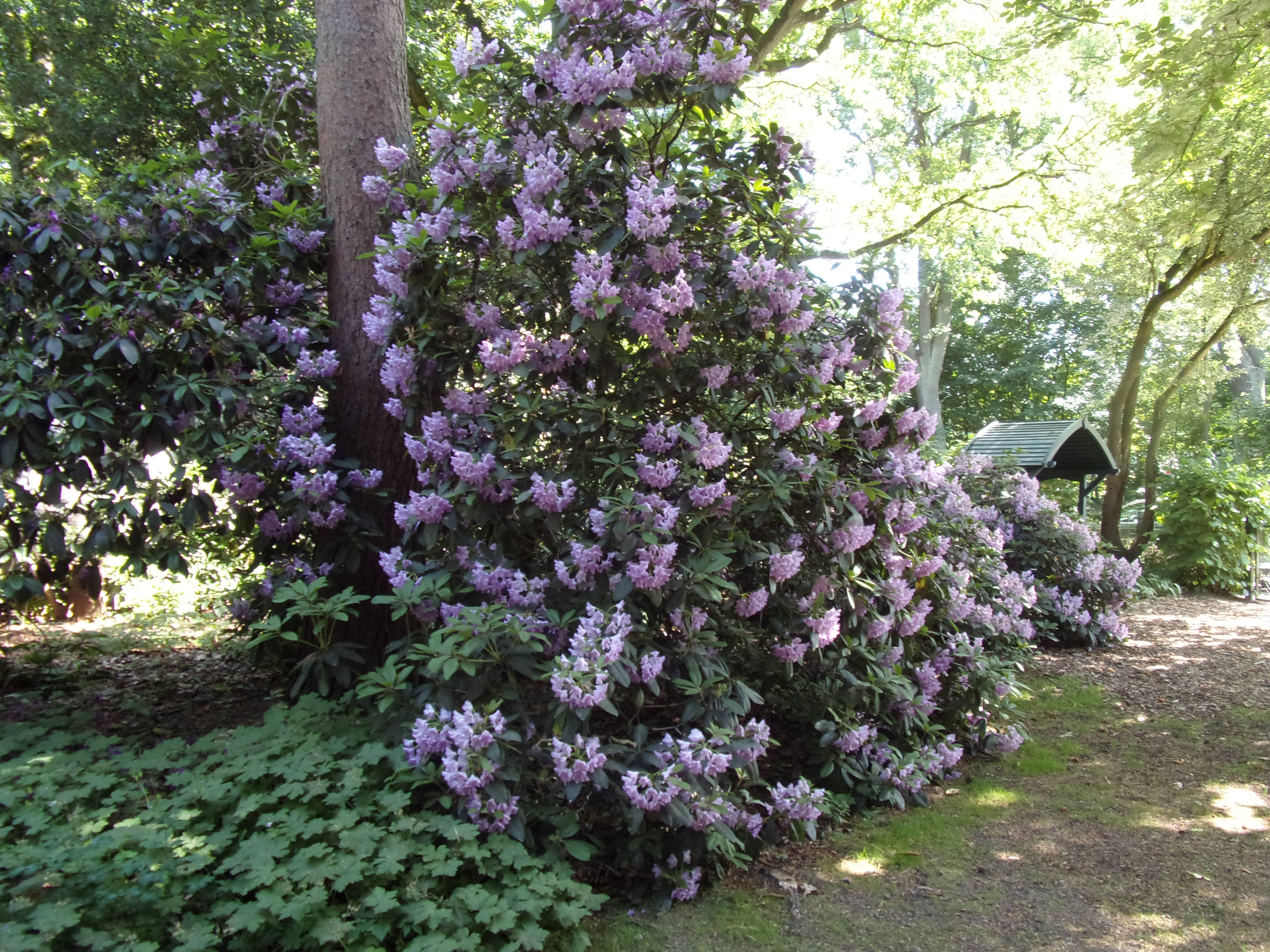 Der Lüttge-Garten in Hamburg-Lokstedt ist benannt nach dem Hamburger Gartenarchitekten Gustav Lüttge, der diesen Garten 1958 an seinem Wohnhaus anlegte und 1968 verstarb. Bäume, Rhododendren, Freiflächen und einige Wege sowie die Zucht von Rhododendren kennzeichnen den unter Denkmalschutz stehenden Garten. Der Verein " Freunde des Lüttge-Gartens in Hamburg-Lokstedt e.V. " betreut und pflegt den heutigen Garten und kümmert sich liebevoll um den Erhalt. Gustav Lüttge war bedeutender Gartenarchitekt und u. a. für den Alsterpark zur Gartenschau 1953 verantwortlich. Mehr Informationen zum Garten unter dem folgendem Link: This is a photograph of an architectural monument.